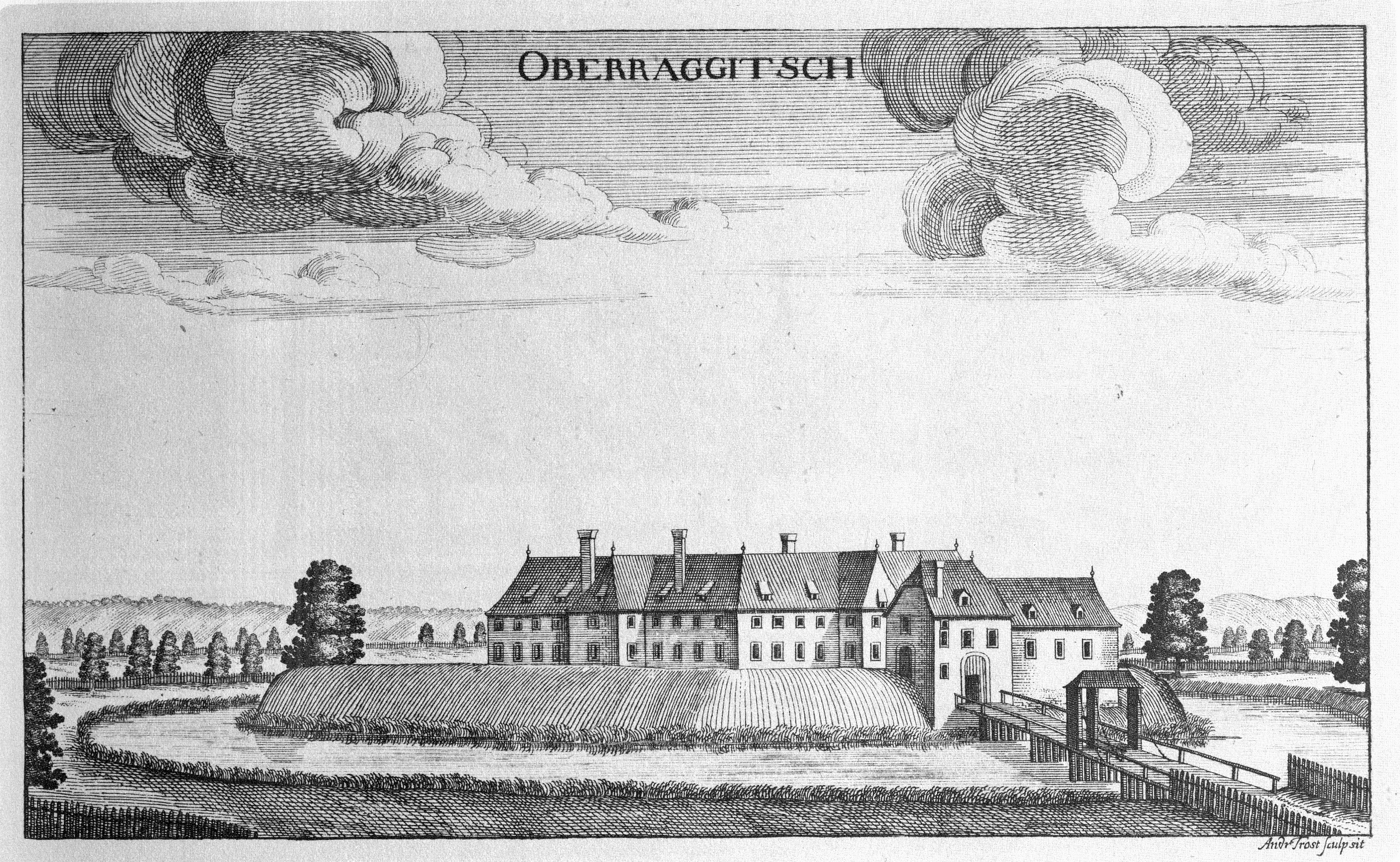 G. M. Vischers Käyserlichen Geographi, Topographia Ducatus Stiriae, Das ist: Eigentliche Delineation / und Abbildung aller Städte / Schlösser / Marcktfleck / Lustgärten / Probsteyen / Stiffter / Clöster und Kirchen / so es sich im Herzogthumb Steyrmarck befinden; Und anjetzo Umb einen billichen Preyß zu finden seynd Bey Johann Bitsch Universitäts Buchhandlern / Auff dem Juden=Platz bey der guldenen Saulen. Graz 1681 Die Nummerierung der Dateien folgt der alphabetischen Reihung der Ortsnamen und entspricht nicht dem Vischer-Register